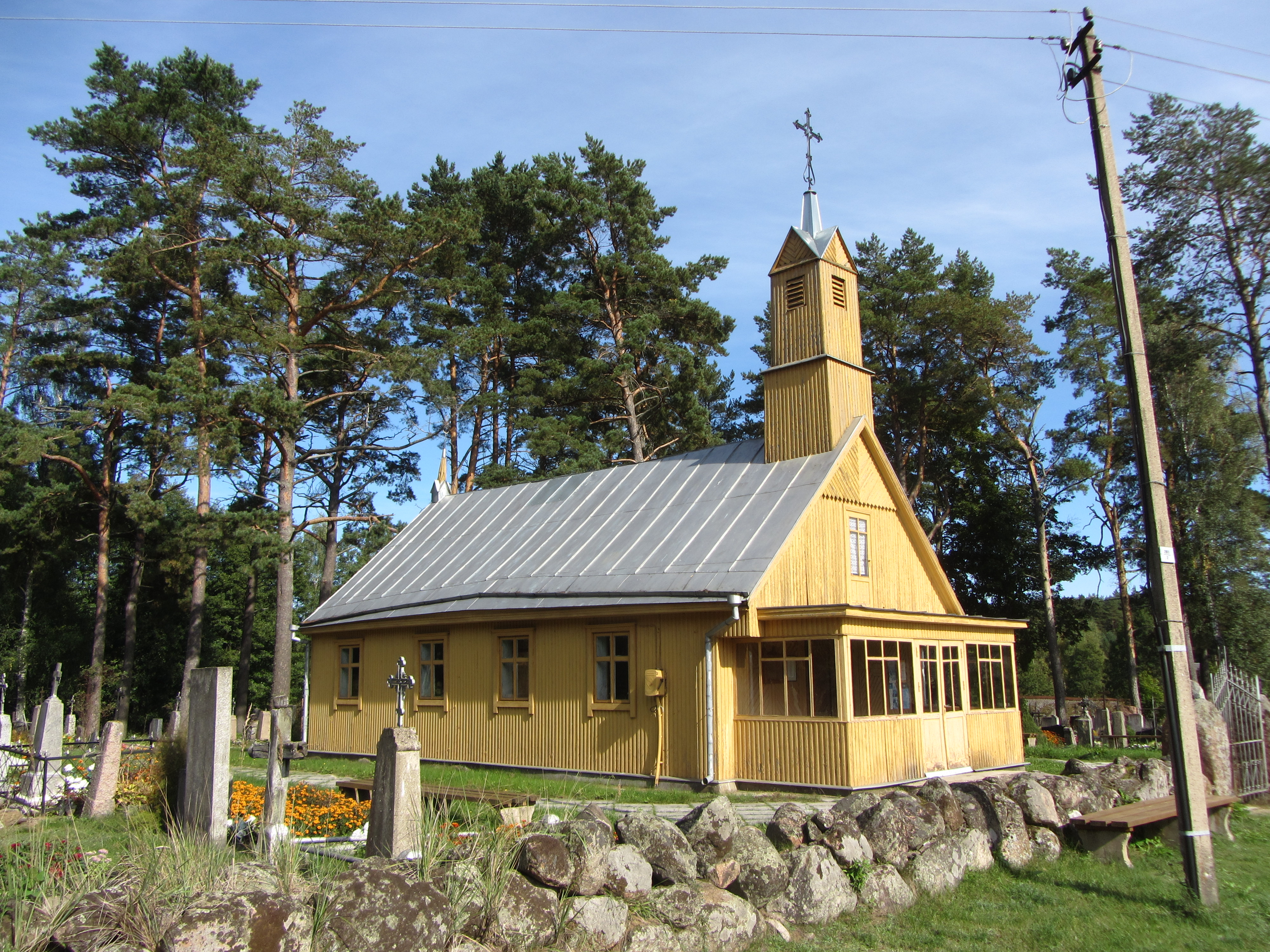 Kazitiškio sen., Lithuania